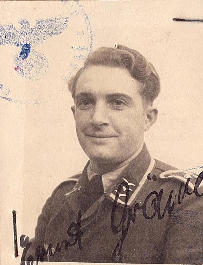 Das Bild zeigt Feldwebel Ernst Gräwe (1914–1945). Es stammt aus seinem Soldbuch.